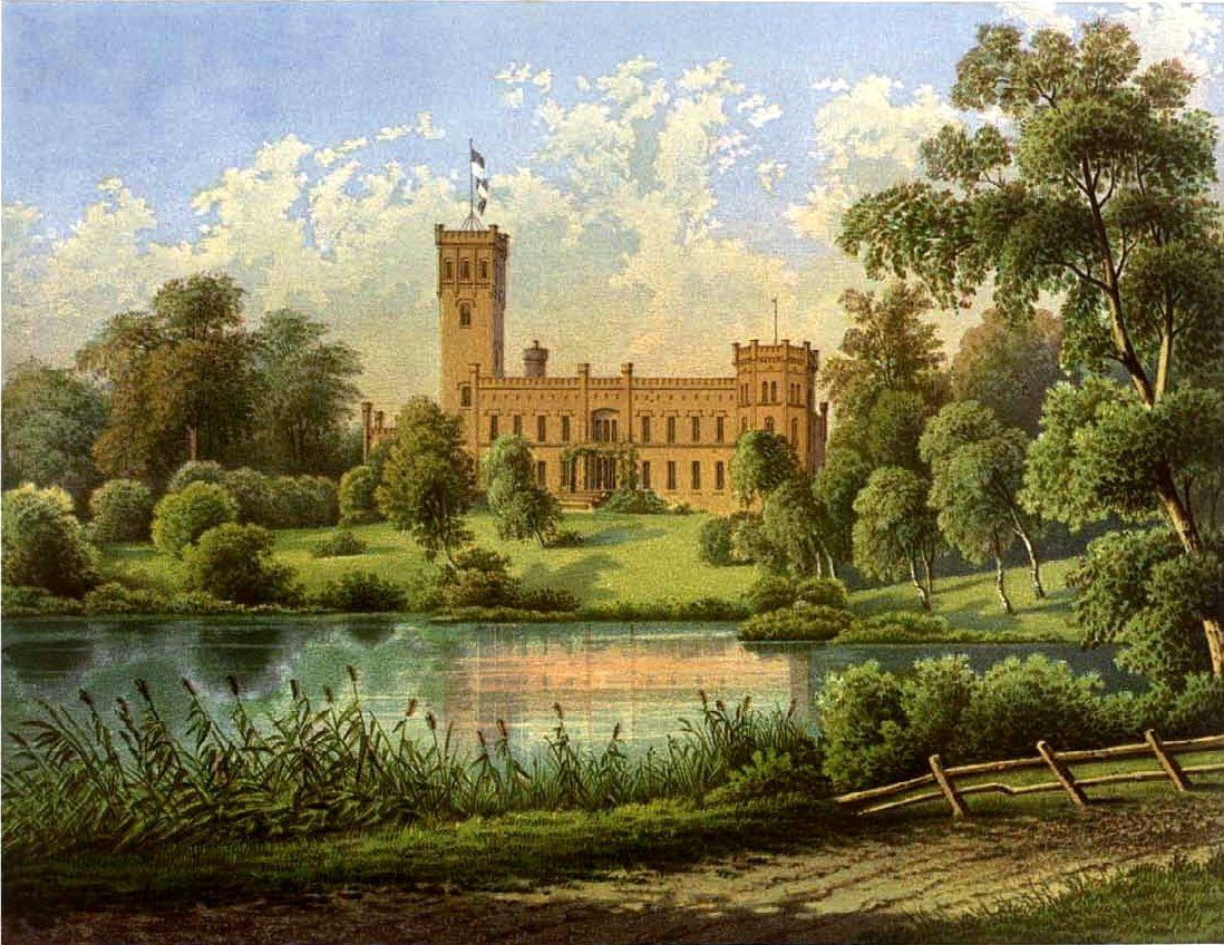 Schloss Arendsee, Landkreis Prenzlau, Provinz Brandenburg